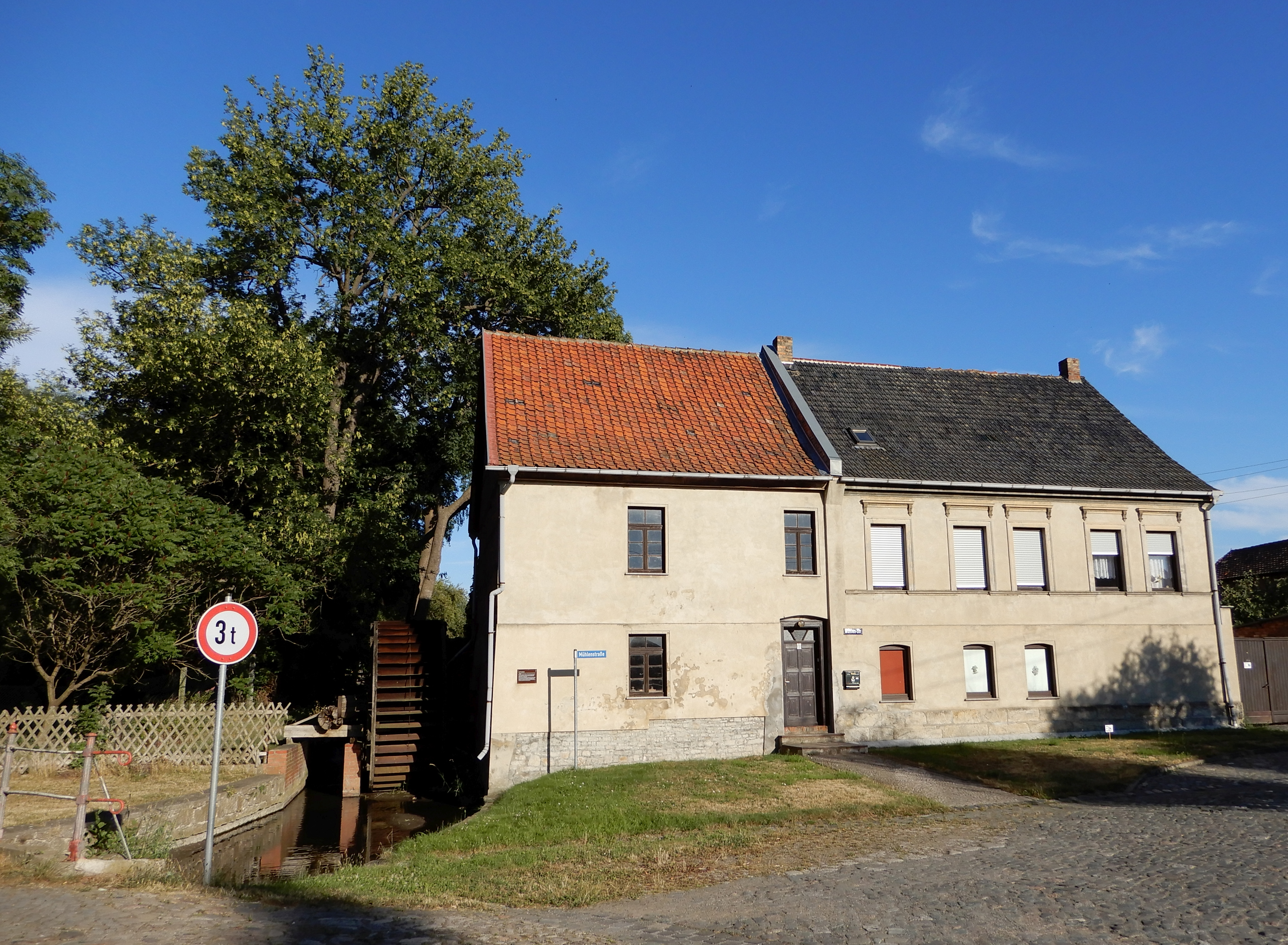 Mittelmühle Hoym